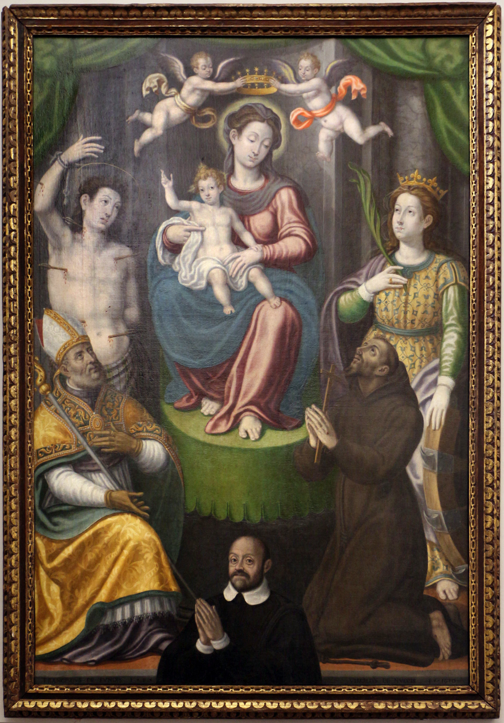 Palazzo Ducale, Gubbio This is a photo of a monument which is part of cultural heritage of Italy.